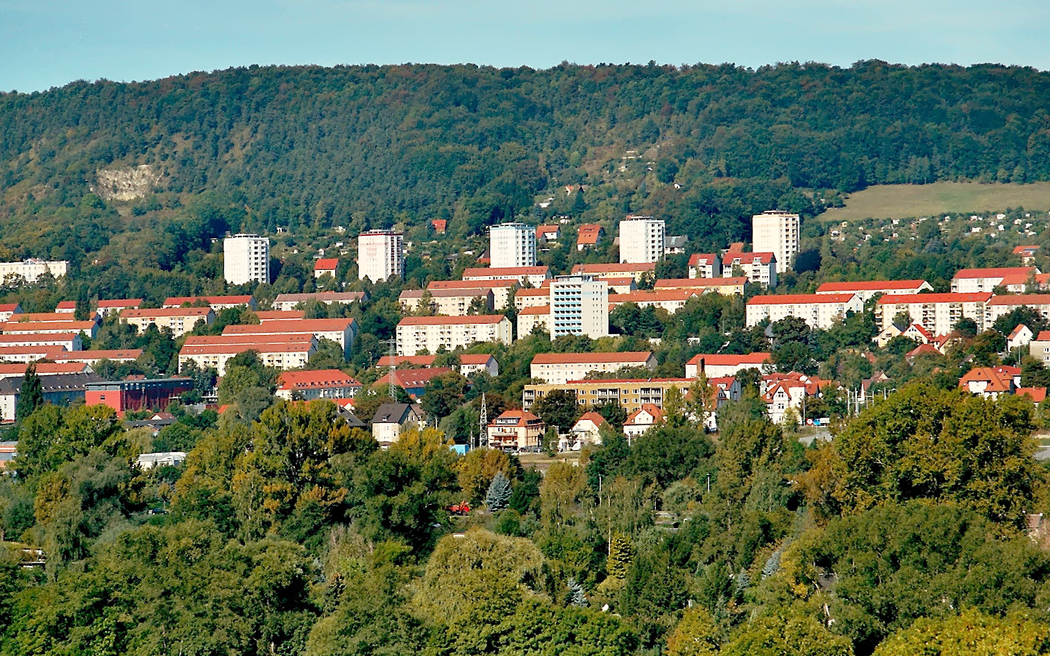 Der Jenaer Stadtteil Nord II, von den Feldern südlich Kunitz her gesehen, September 2004. Zu beachten: die Hochhäuser in der Closewitzer Straße.